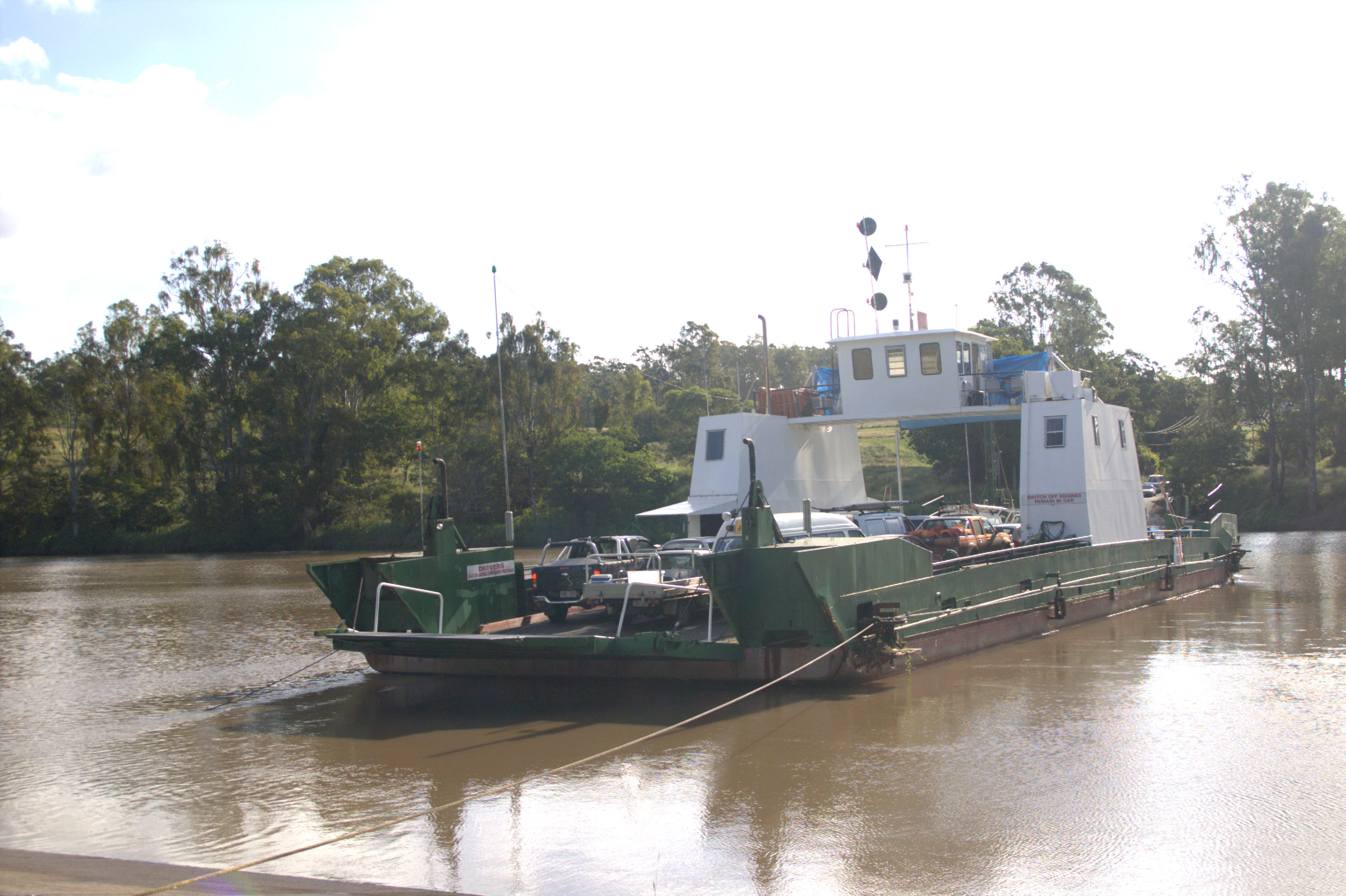 Moggill Ferry